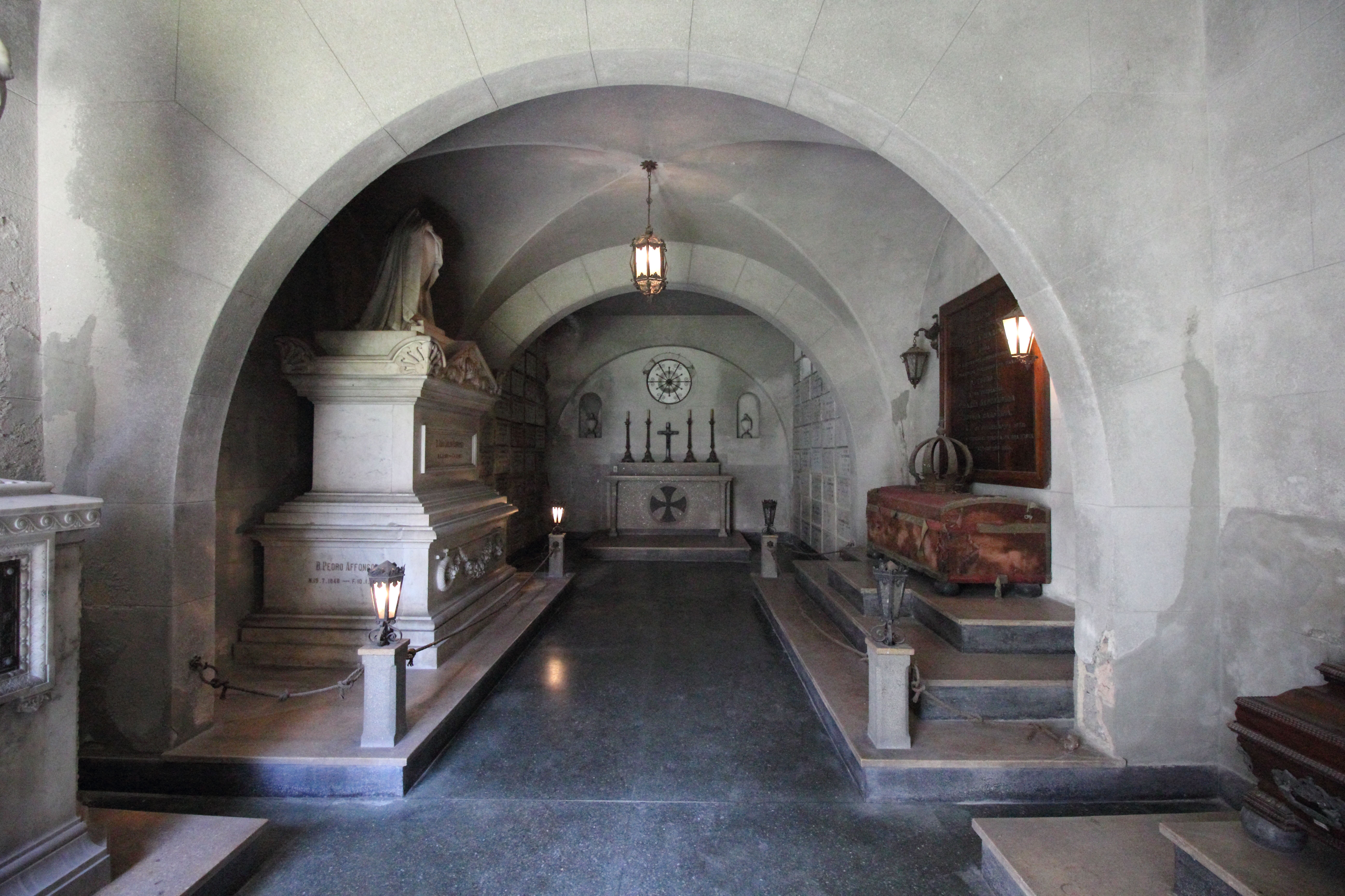 Convento de Santo Antônio do Largo da Carioca